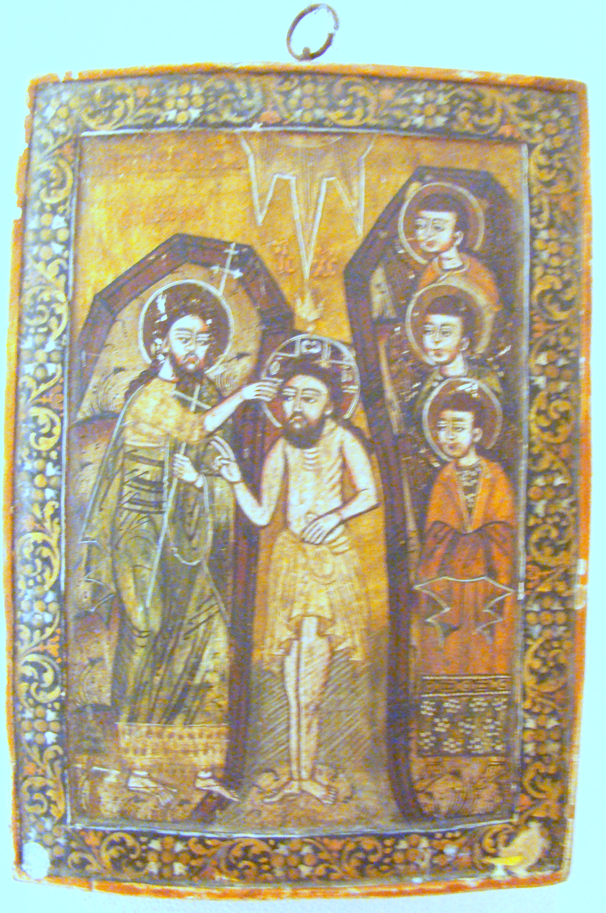 Muzeul grăniceresc năsăudean